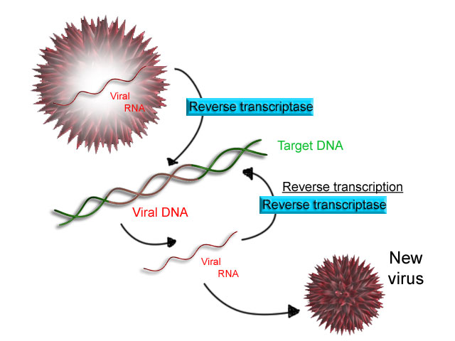 Schéma expliquant la transcription inverse, issue de en